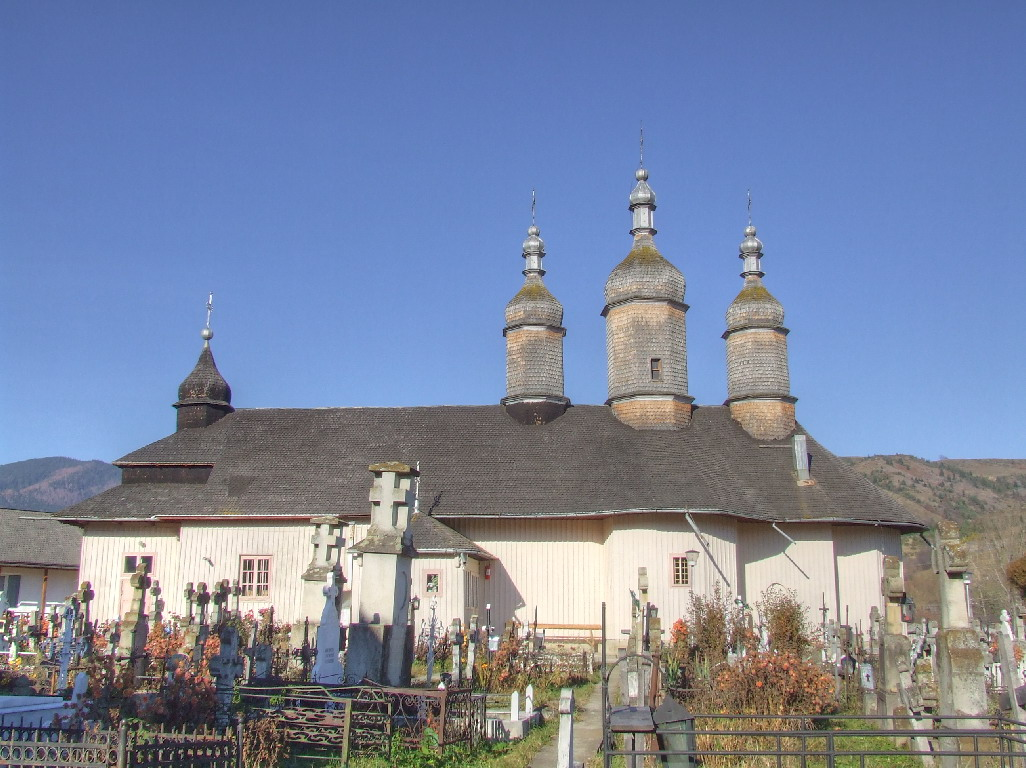 Biserica de lemn din Pipirig, judeţul Neamţ.